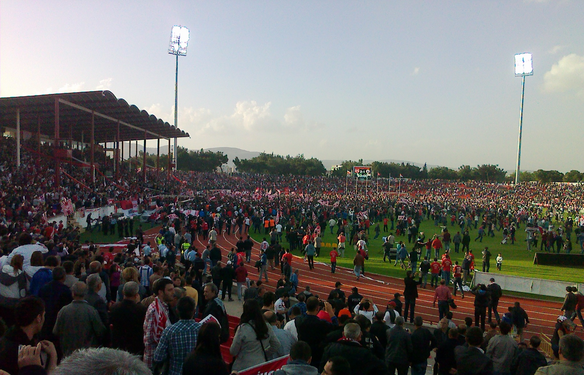 4 Mayıs 2014 tarihindeki İBB maçı.